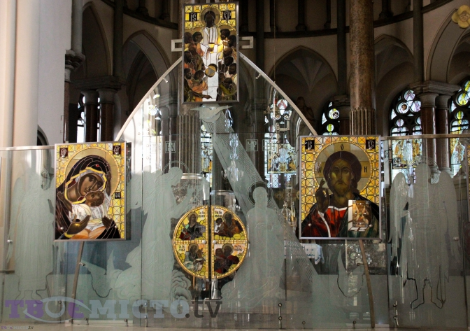 групою художників-вітражистів (Юрій Павельчук, Олександр Личко) в церкві було встановлено перший в Україні вітражний іконостас.